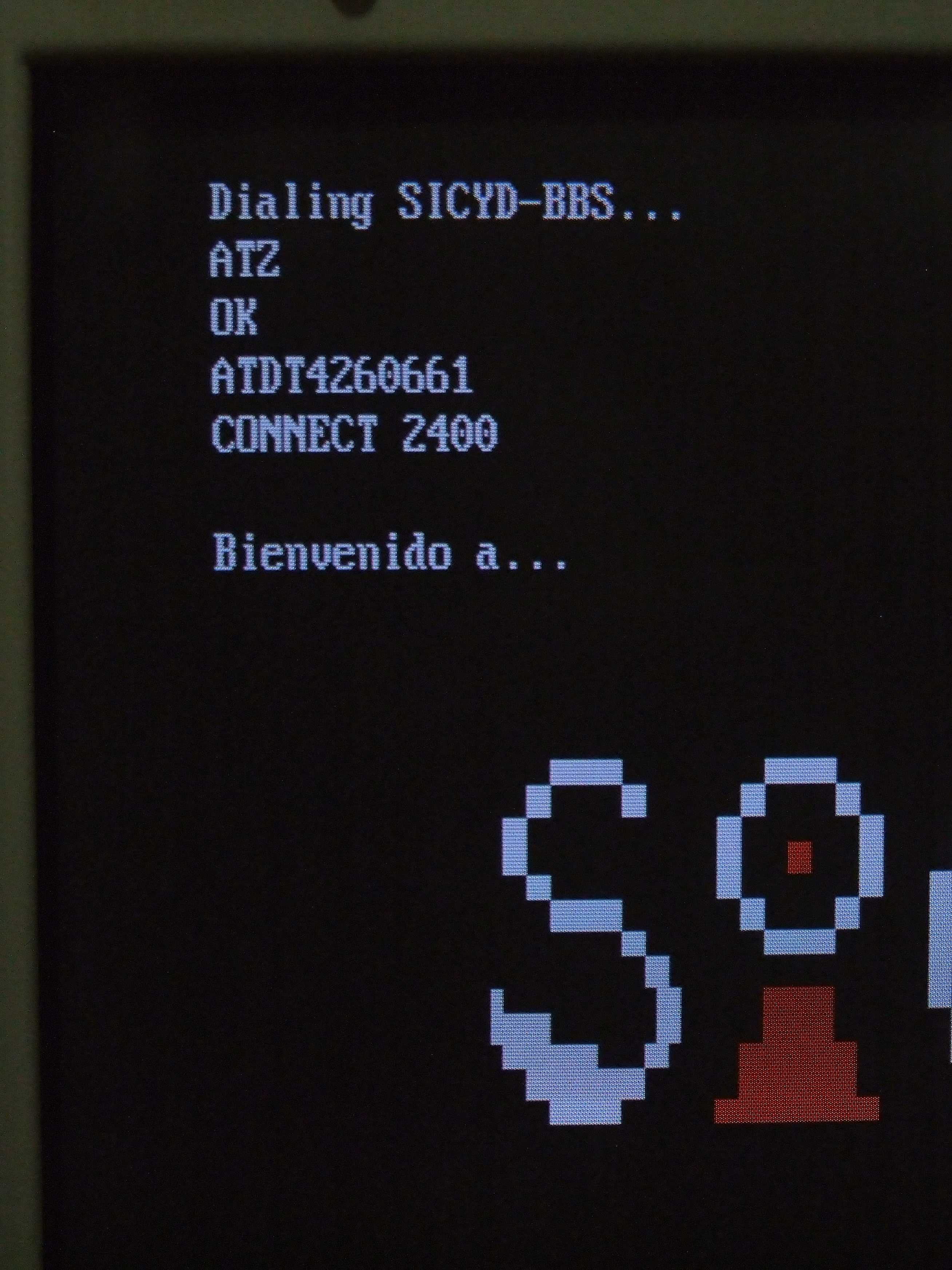 Entrando a la BBS